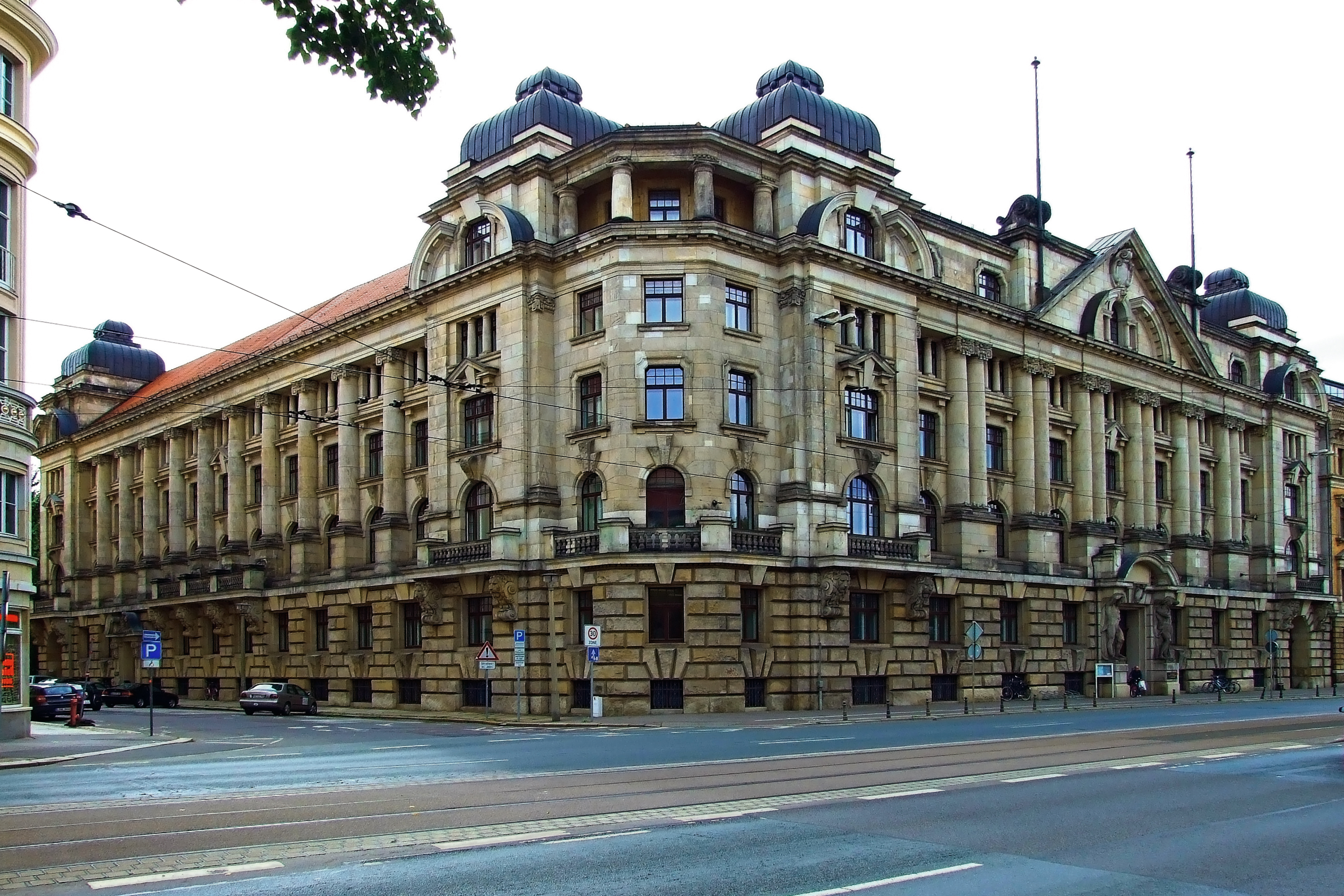 Hochschule für Musik und Theater "Felix Mendelssohn Bartholdy" am Dittrichring, Leipzig